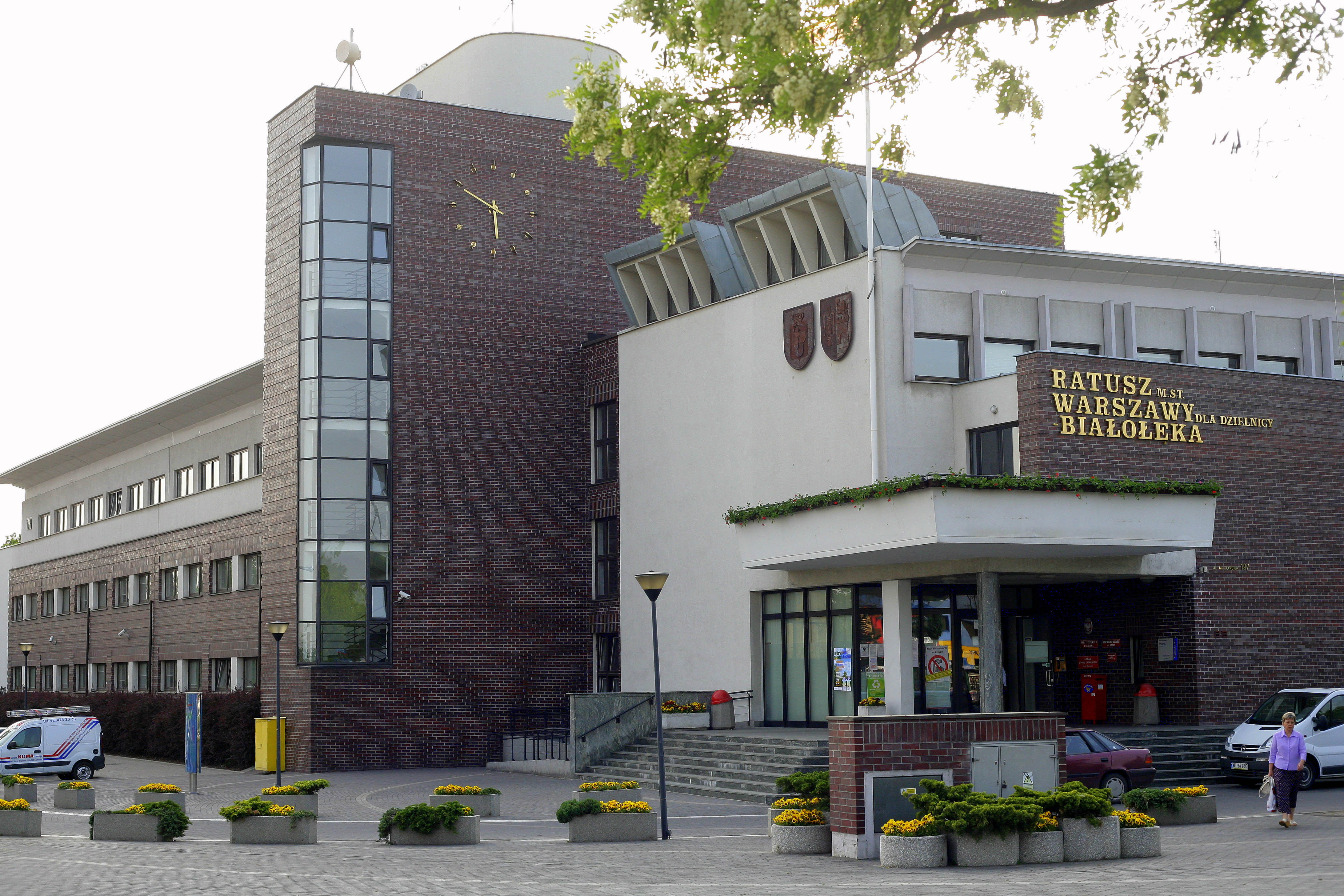 Ratusz dla dzielnicy Białołęka